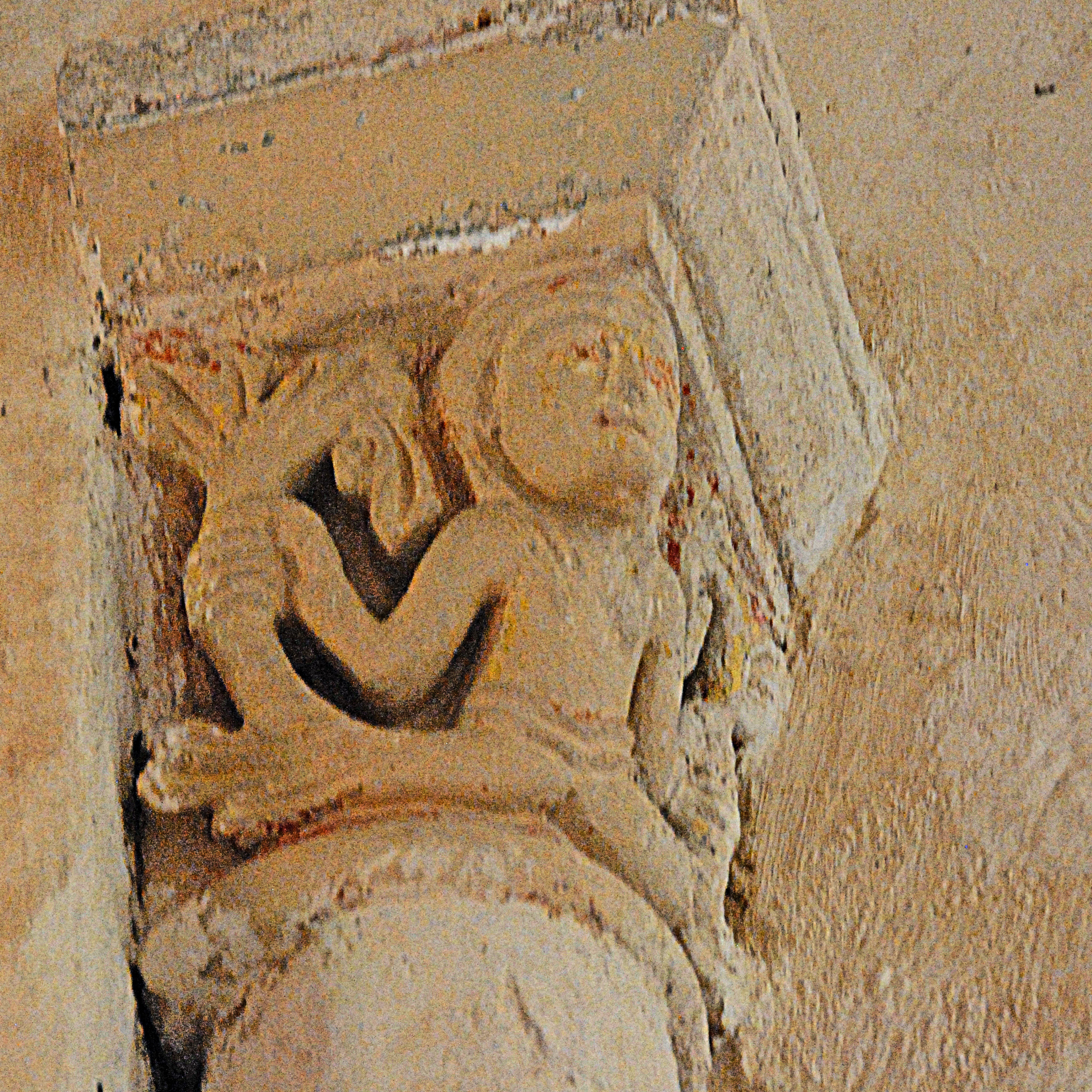 St.-Jean Glaine-Montaigut; Kapitell, Sirene 2